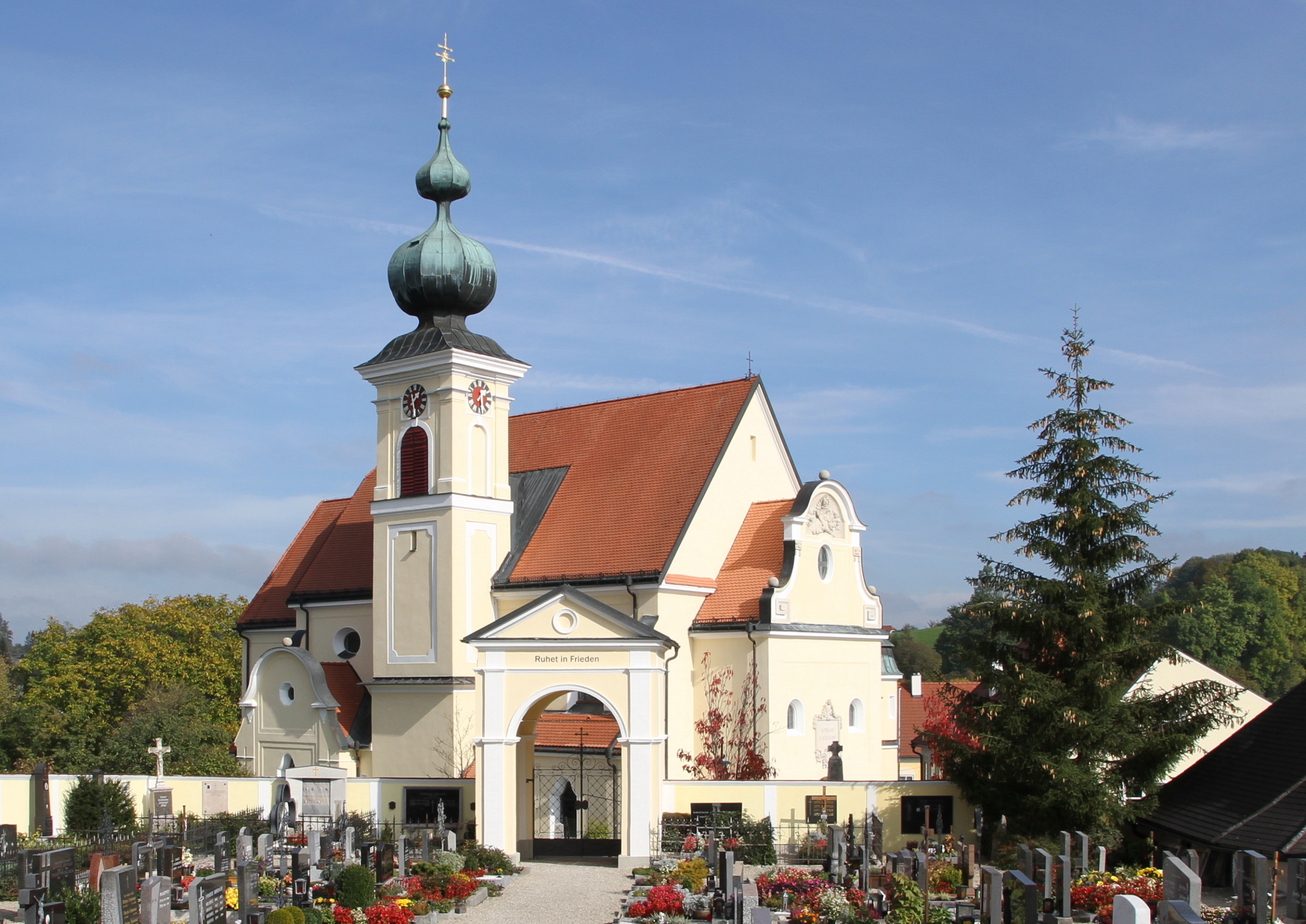 Die katholische Pfarrkirche hl. Margareta in der oberösterreichischen Gemeinde Niederthalheim. Die Kirche wurde 1913 errichtet, unter Einbeziehung des spätgotischen Chors (heute eine Seitenkapelle) und des barockisierten Westturmes der Vorgängerkirche.